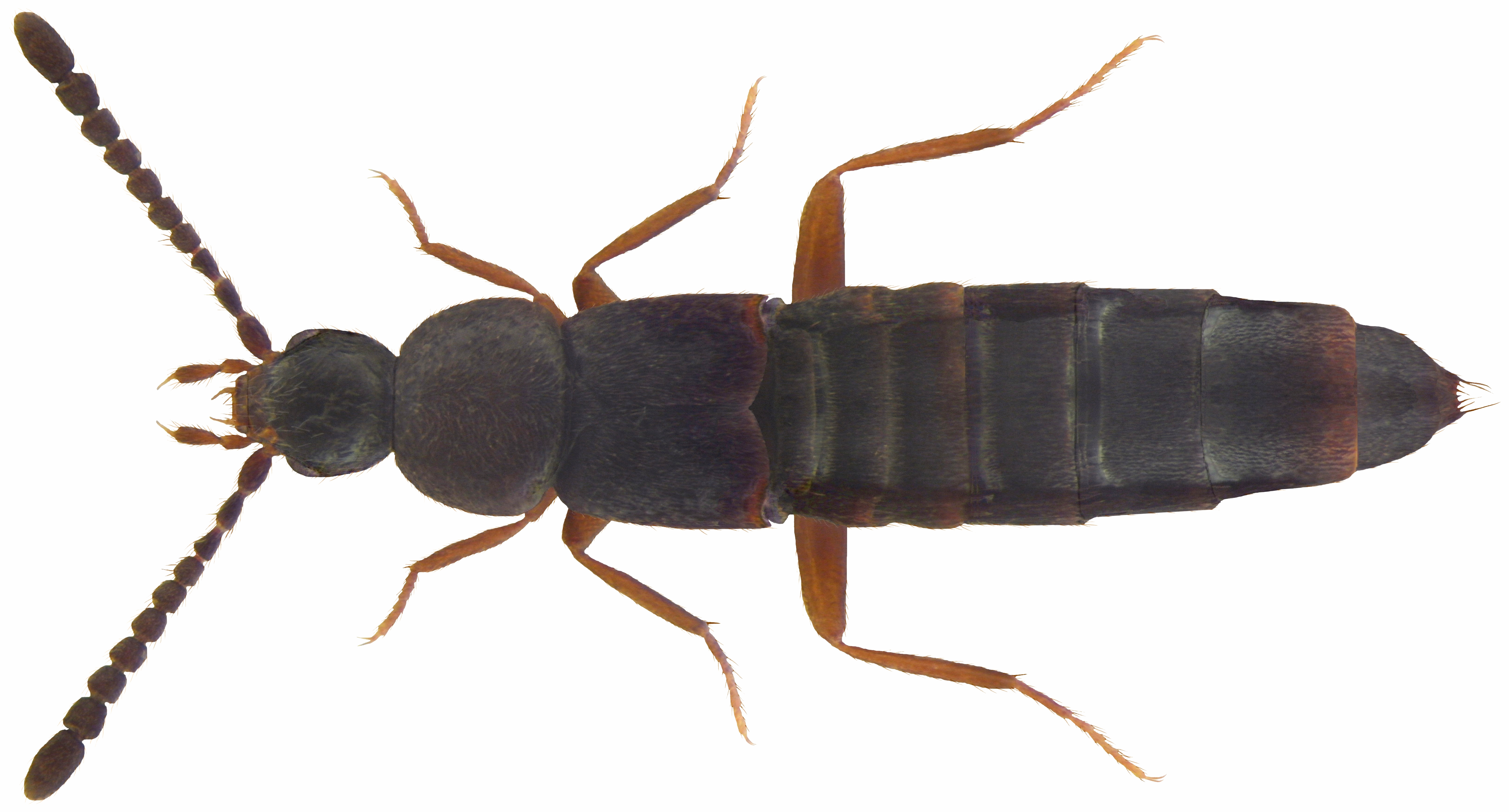 Familie: Staphylinidae Groesse: 3-3,8 mm Verbreitung: Europa Ökologie: in Feuchtgebieten, im Anspülicht Fundort: Germania, Bayern, Oberfranken, Rehau, Rehauer Forst leg.det. U.Schmidt, 2005 Photo: U.Schmidt, 2010